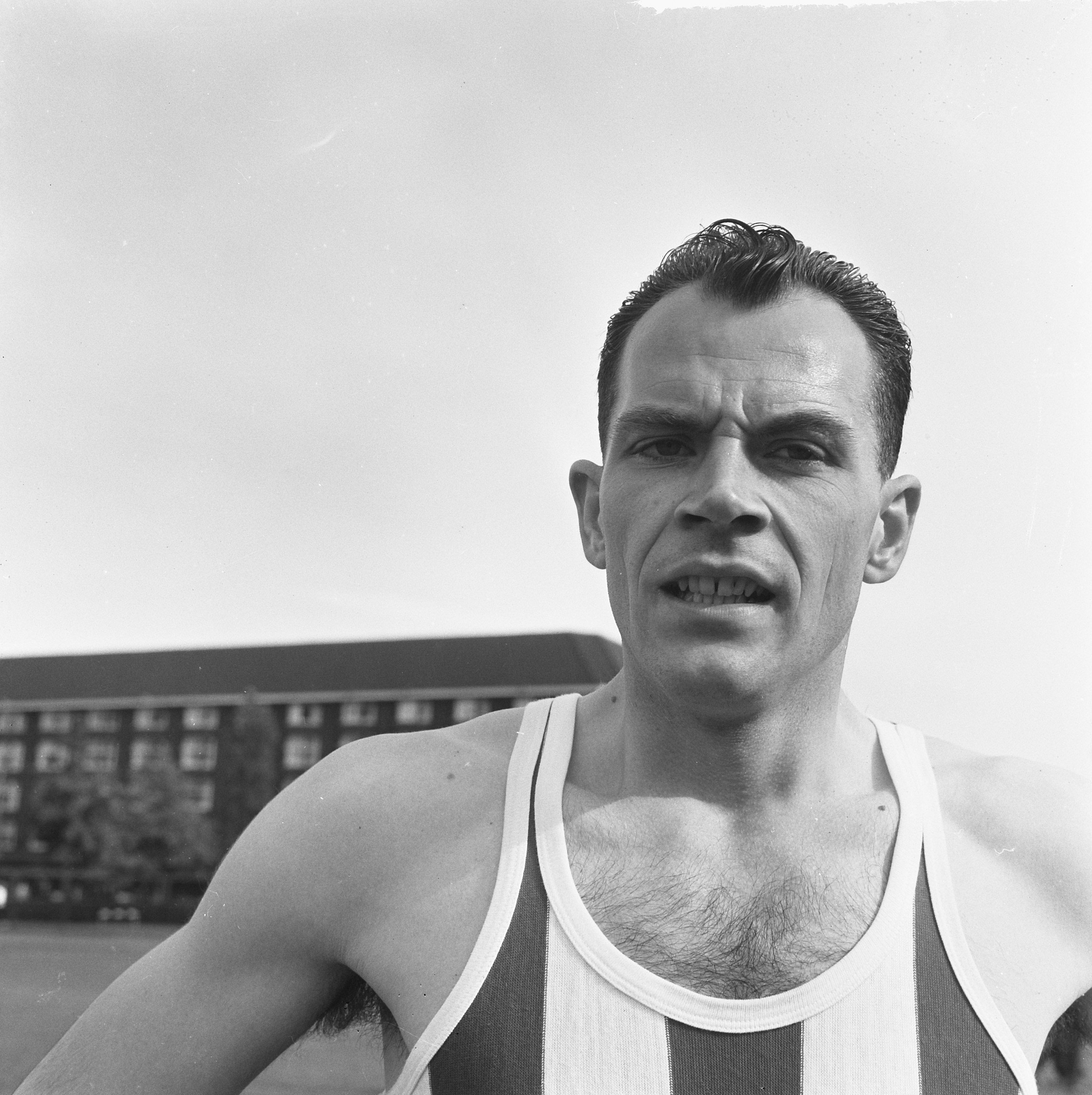 Collectie / Archief : Fotocollectie Anefo Reportage / Serie : [ onbekend ] Beschrijving : Open Amsterdamse atletiekkampioenschappen op de Sintelbaan Rob Heemskerk Datum : 7 augustus 1965 Trefwoorden : atletiek, kampioenschappen Persoonsnaam : Heemskerk, Rob Instellingsnaam : Sintelbaan Fotograaf : Evers, Joost / Anefo Auteursrechthebbende : Nationaal Archief Materiaalsoort : Negatief (zwart/wit) Nummer archiefinventaris : bekijk toegang 2.24.01.03 Bestanddeelnummer : 918-0469